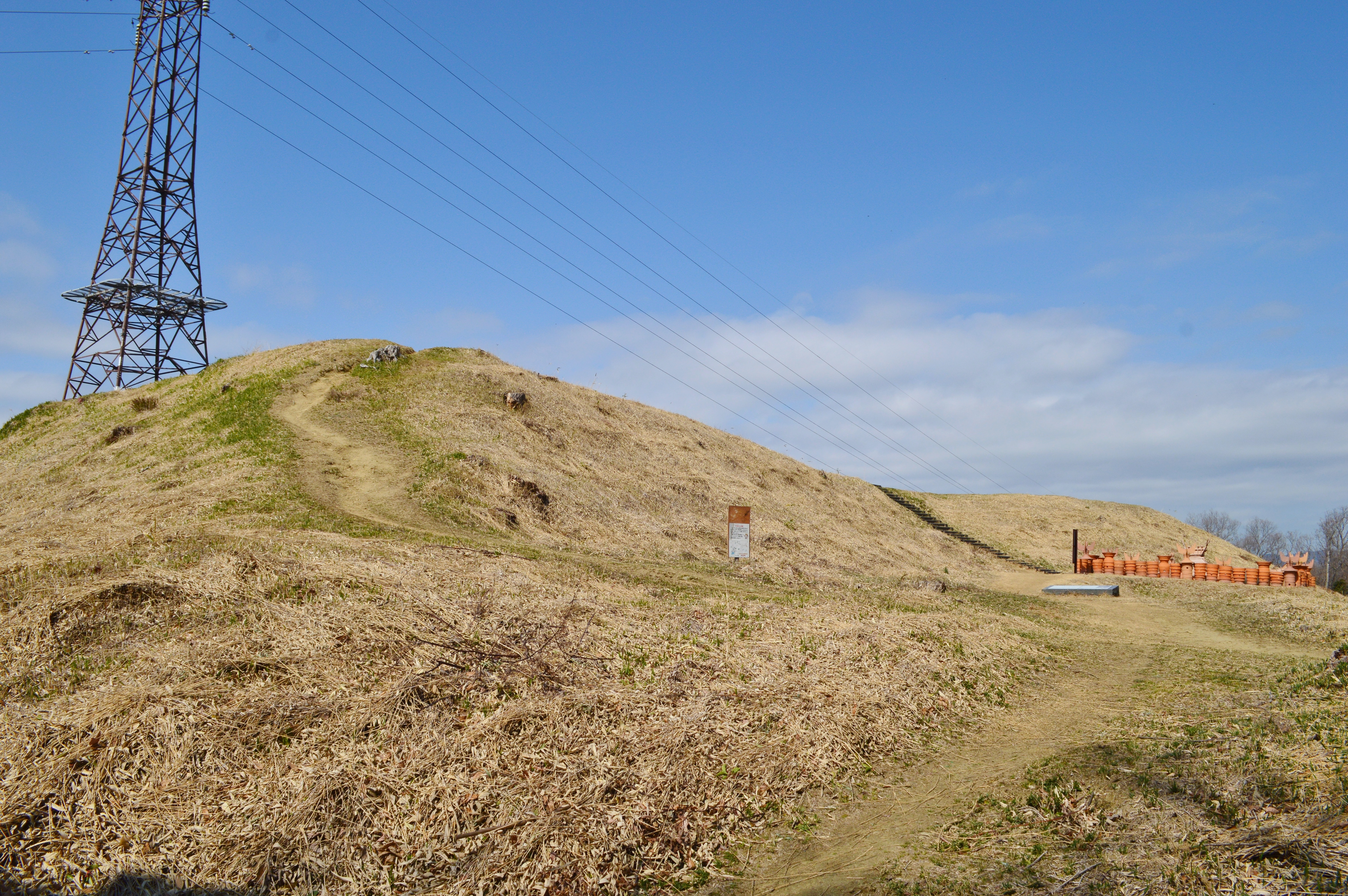 大日山35号墳 墳丘全景